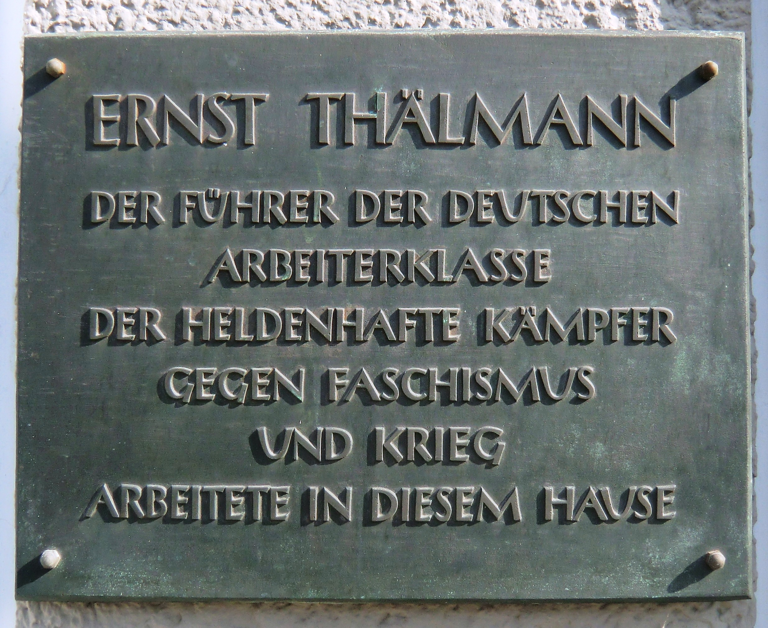 Gedenktafel an Ernst Thälmann, dem Führer der deutschen Arbeiterklasse, am Karl-Liebknecht-Haus in Berlin.